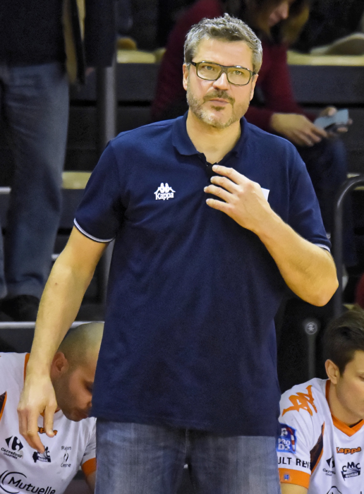 Rencontre de ProD2 entre l'US Ivry handball et Chartres HB. A Ivry, le 06 décembre 2014.